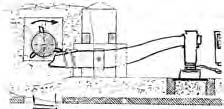 Ricostruzione grafica maglio di san martino parte 1-1